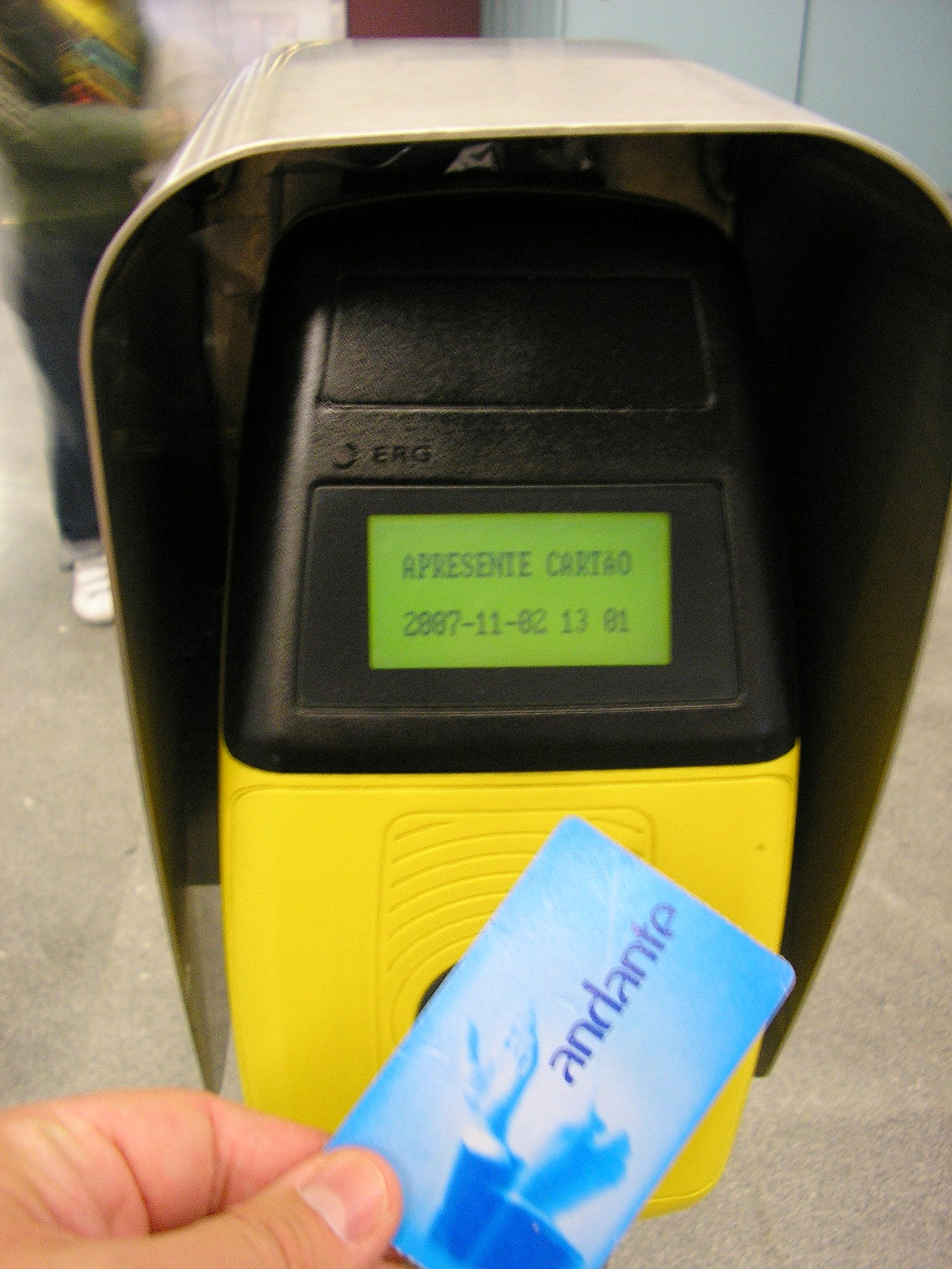 "Andante", Metro ticket in Porto, Portugal